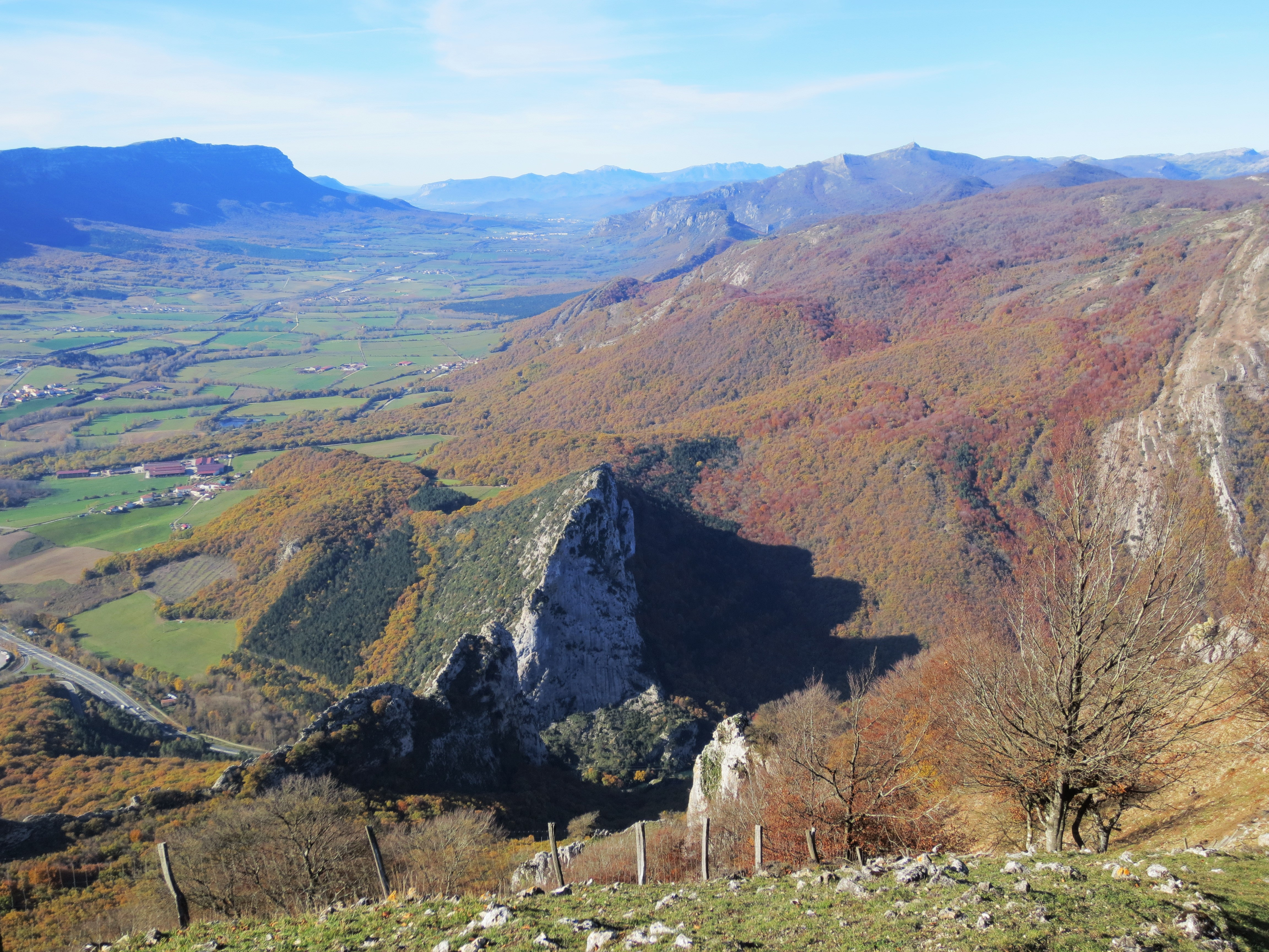 Sakana eta Biaizpe Ergako maldatik